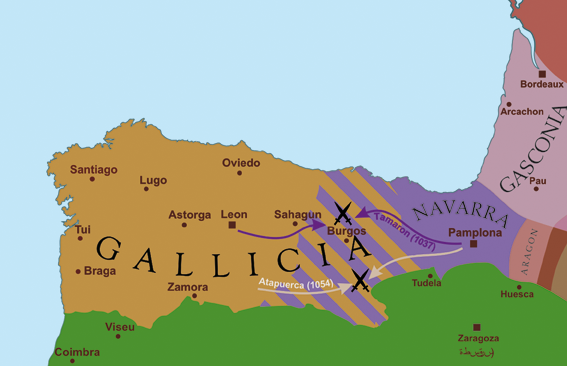 Mapa histórico que amosa as conflitividades e contendas militares entre as terras navarras/vascas e galaicas, no século X.